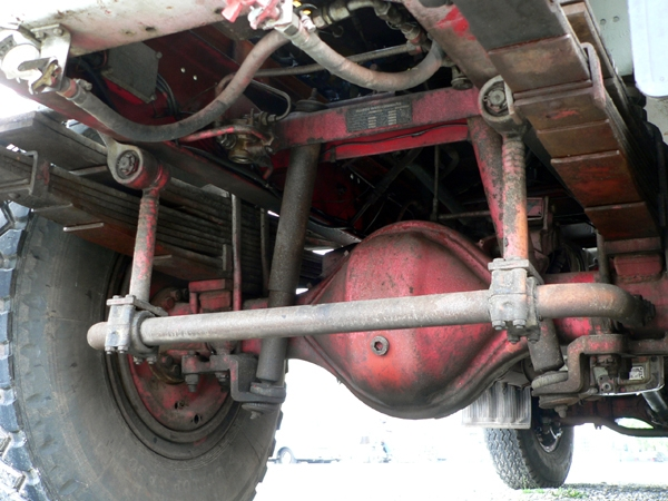 Задняя подвеска автомобиля Magirus-Deutz. Задний мост, рессоры, амортизаторы, реактивные штанги